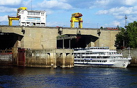 Чайковский судоходный шлюз.